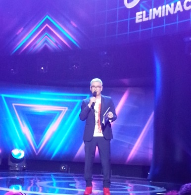 Polski dziennikarz Artur Orzech podczas krajowych eliminacji do 62. Konkursu Piosenki Eurowizji.